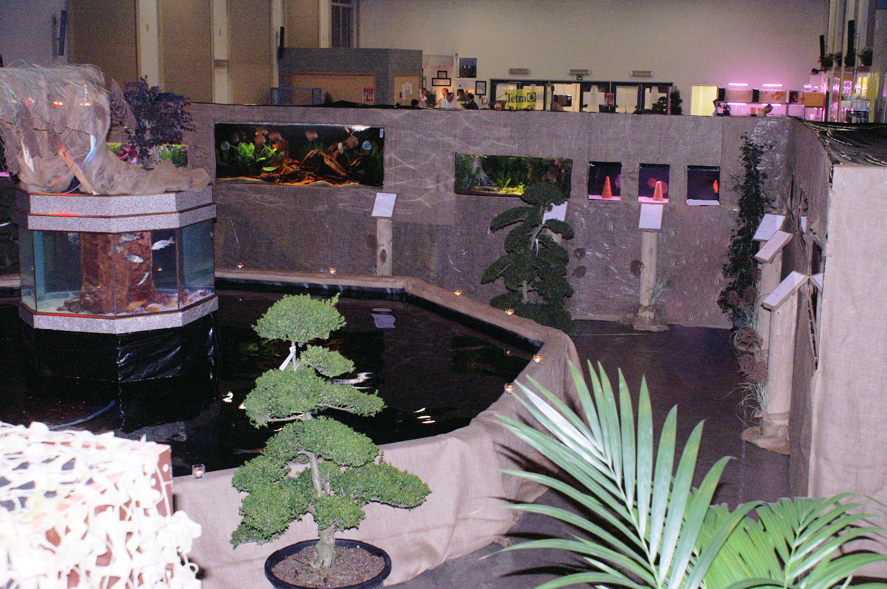 Description Tentoonstelling van "De Discusvrienden" Date22 January 2007Sourcezelfgemaakte fotoAuthordiscus Tentoonstelling van "De Discusvrienden"